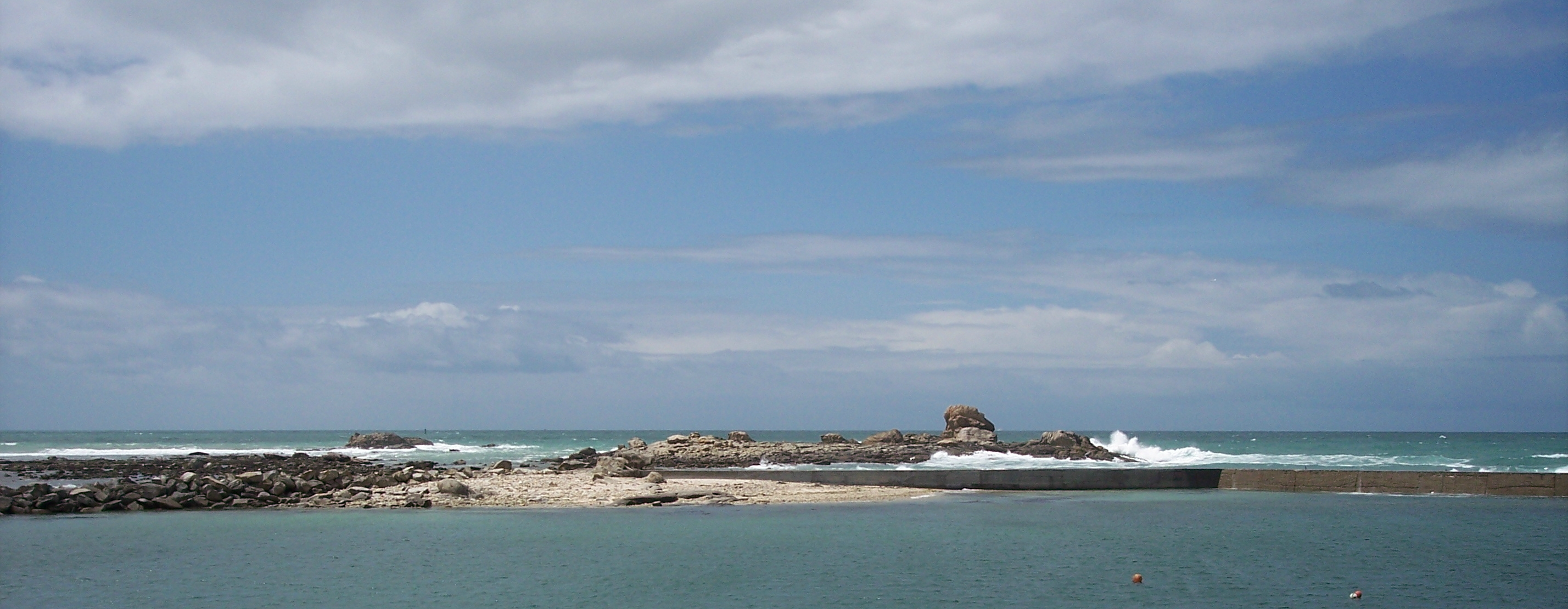 la presqu'île de Conq qui protège le port de Saint-Guénolé du côté nord-ouest. 23/05/2006 - photo Henri Camus